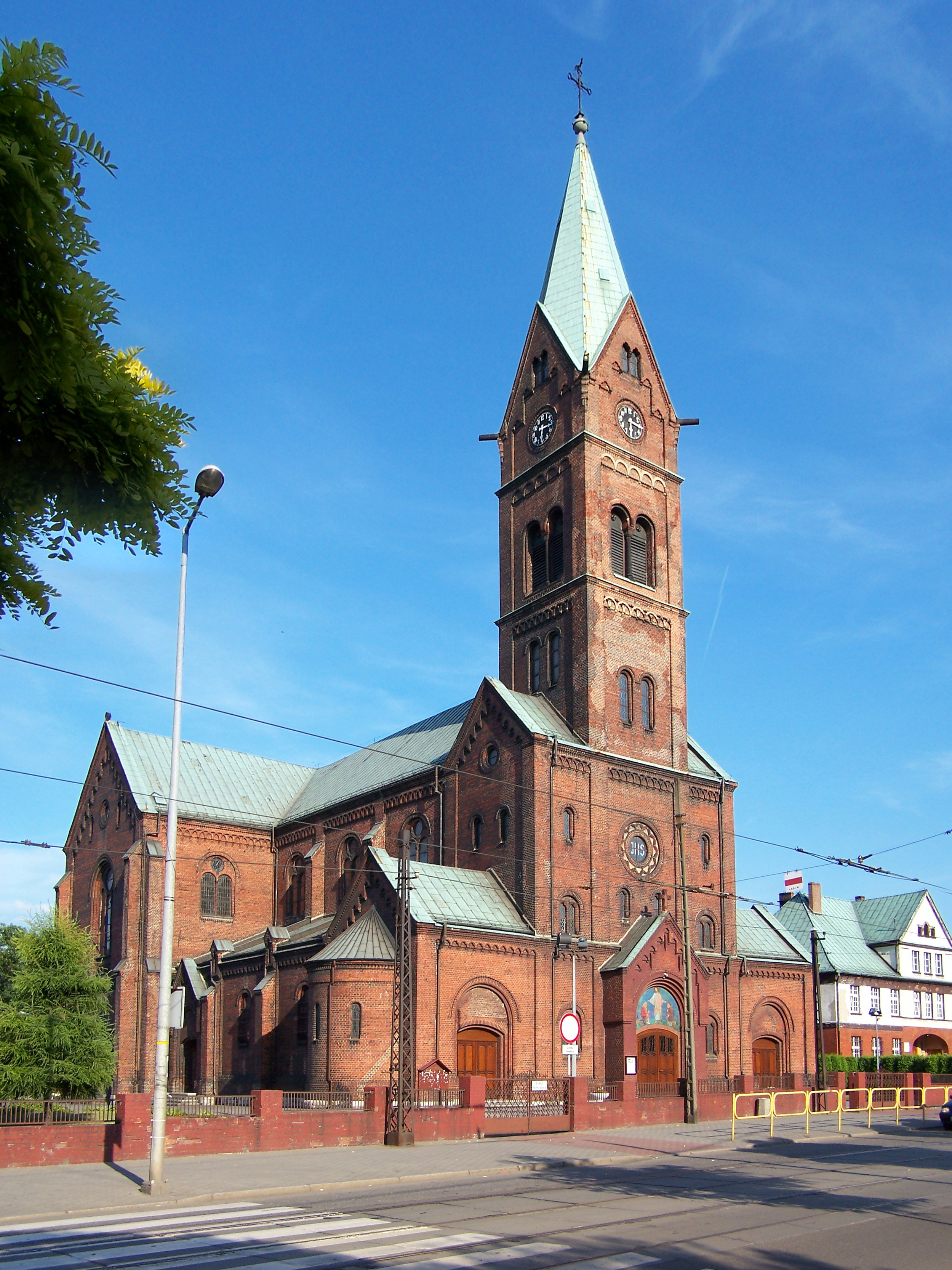 Kościół pw. Świętej Rodziny w Bobrku - dzielnicy Bytomia.